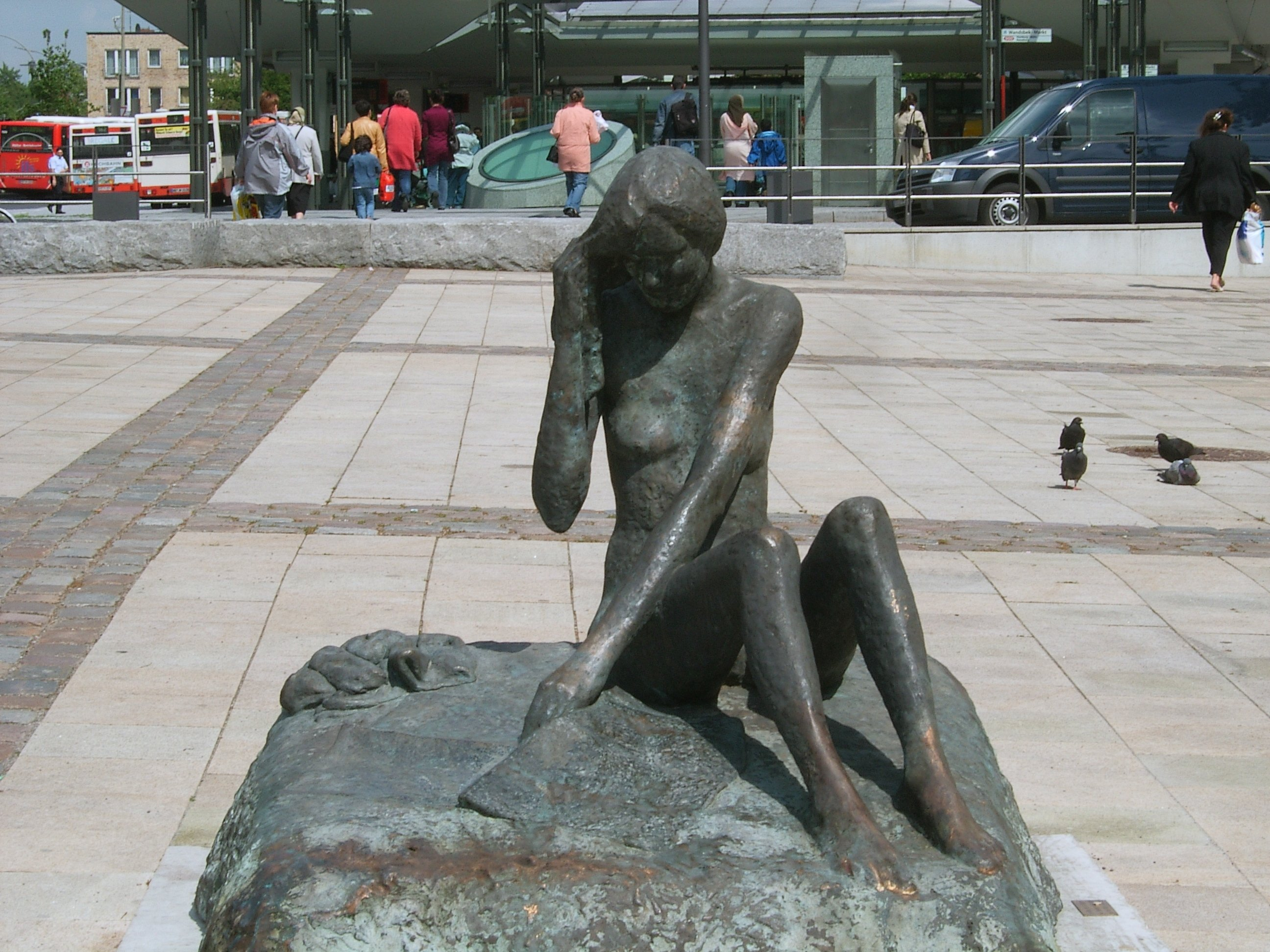 Frauenskulptur auf dem Wandsbeker Markt, betitelt Zeitungslesende am Strand.